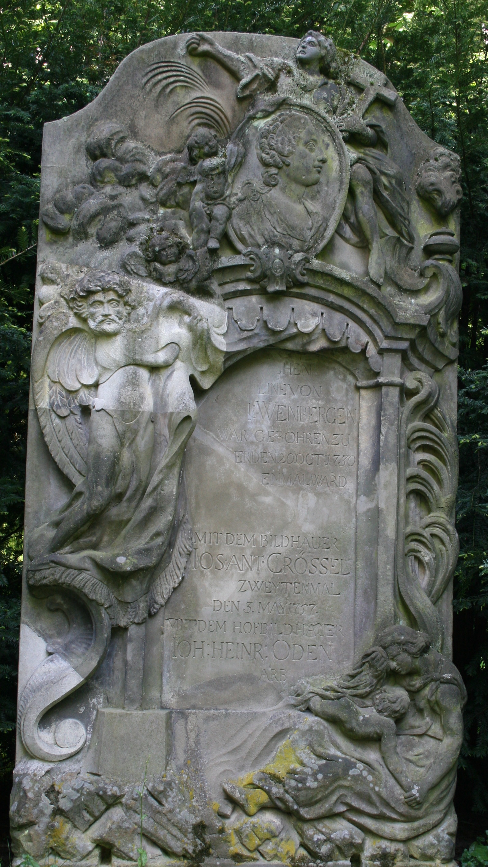 Grabmal Oden, Steinmetz und Bildhauer, Braunschweig, Magnifriedhof